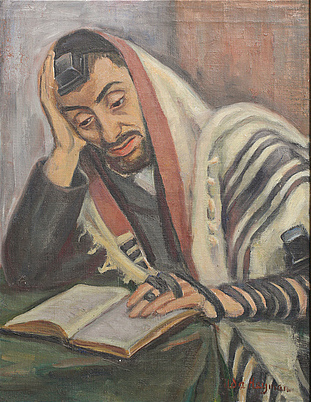 Hilde Hetman Portret czytającego Żyda 31 x 40,5 cm